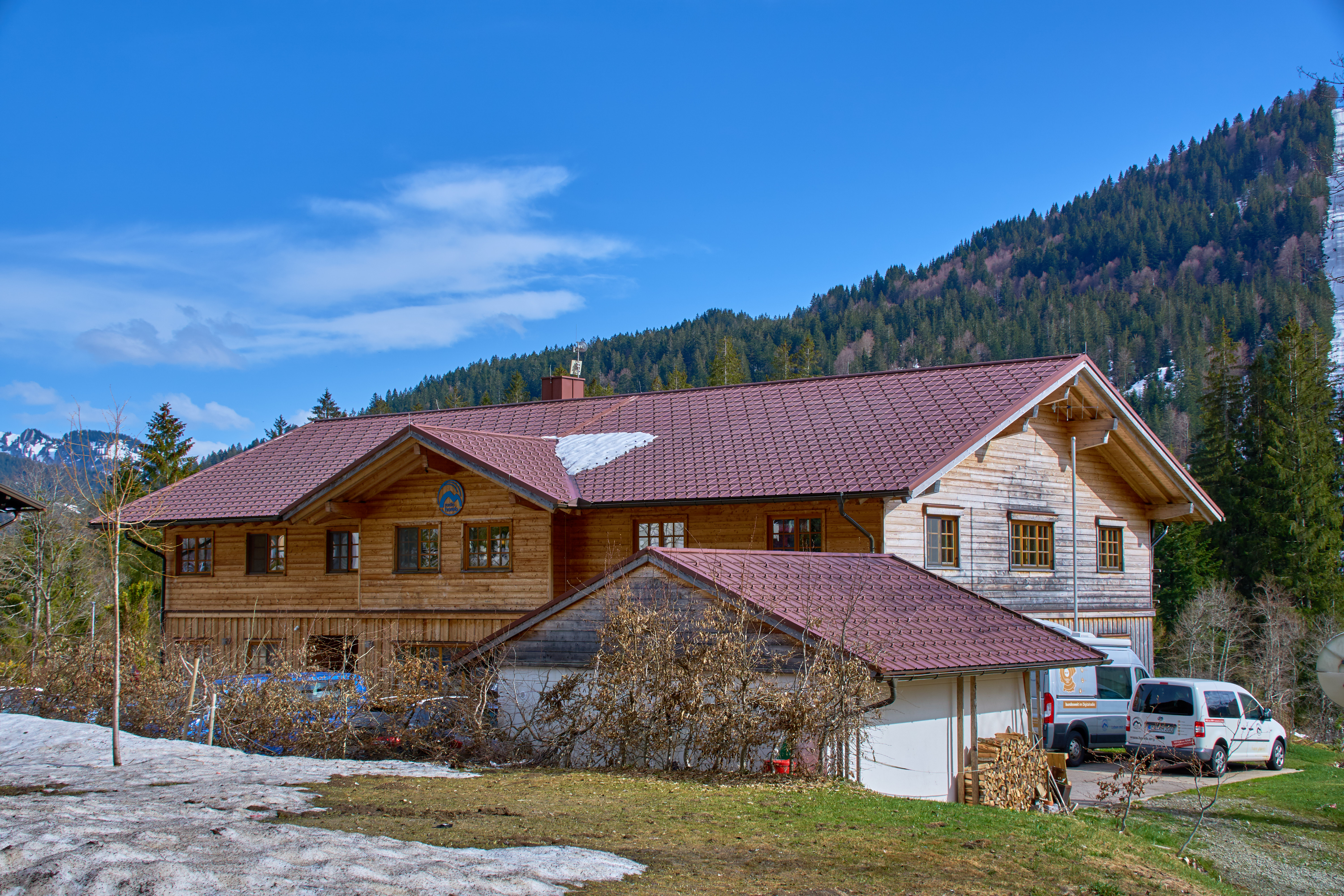 Hier sieht man das Medienhaus von Radio Horeb in Balderschwang, welches zugleich die Zentrale des christlich geprägten Radiosenders ist.